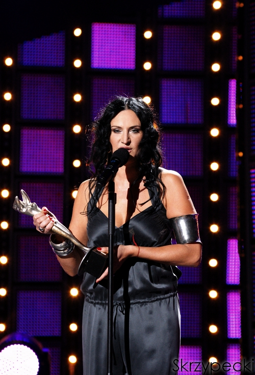 Kayah @ 46. KFPP in Opole.